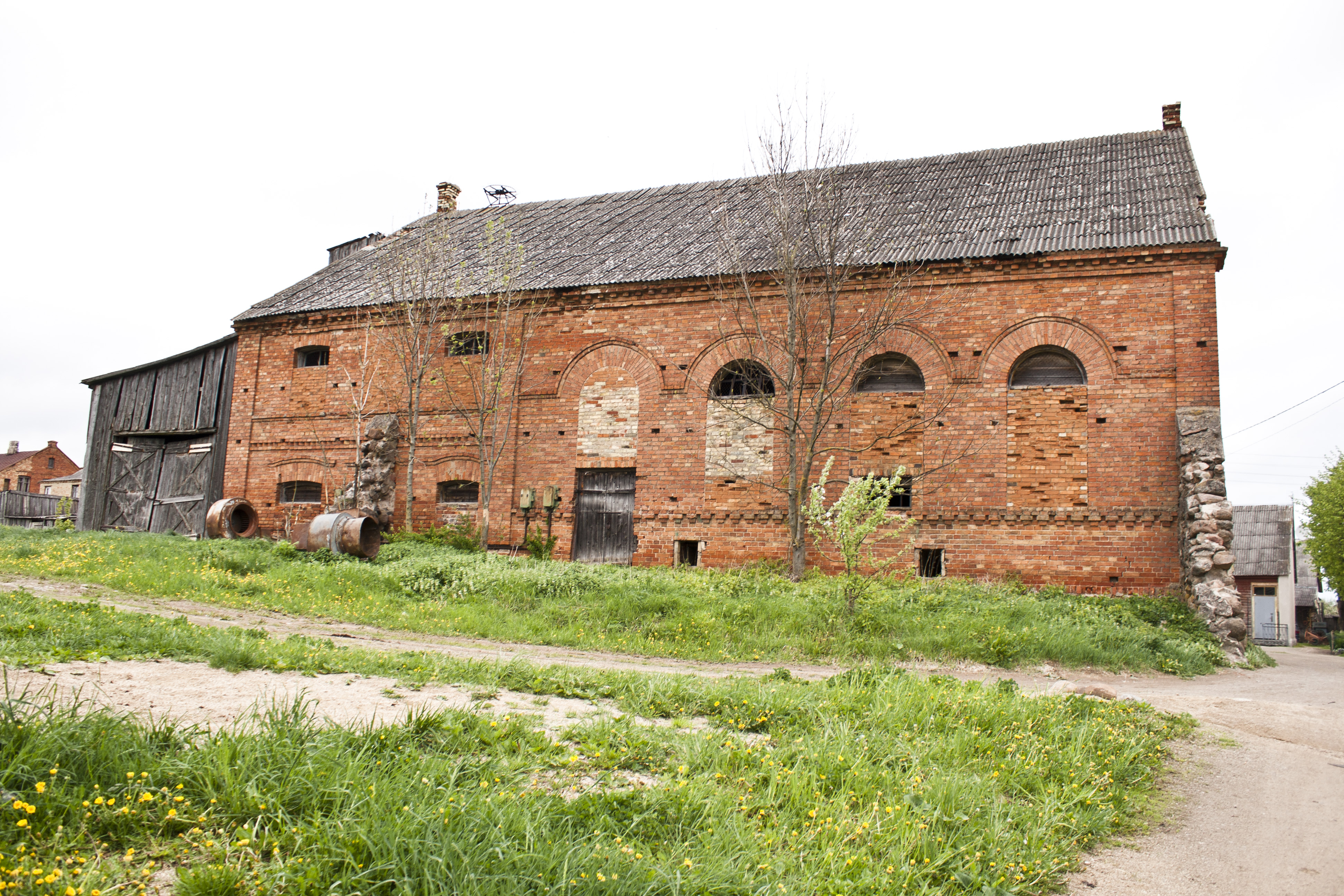 Lygumai synagogue